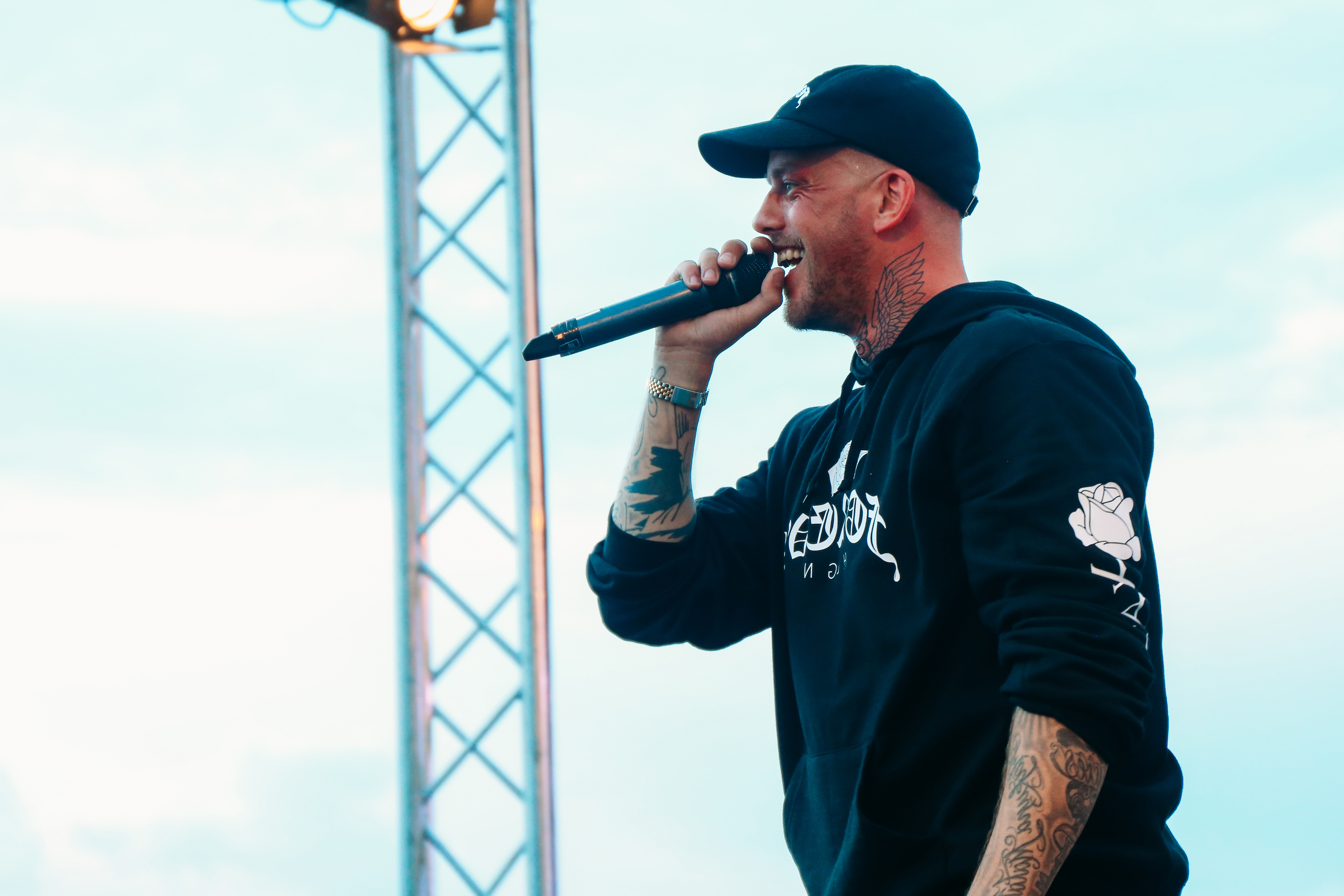 Jebroer tijdens C'est la Vie 2017